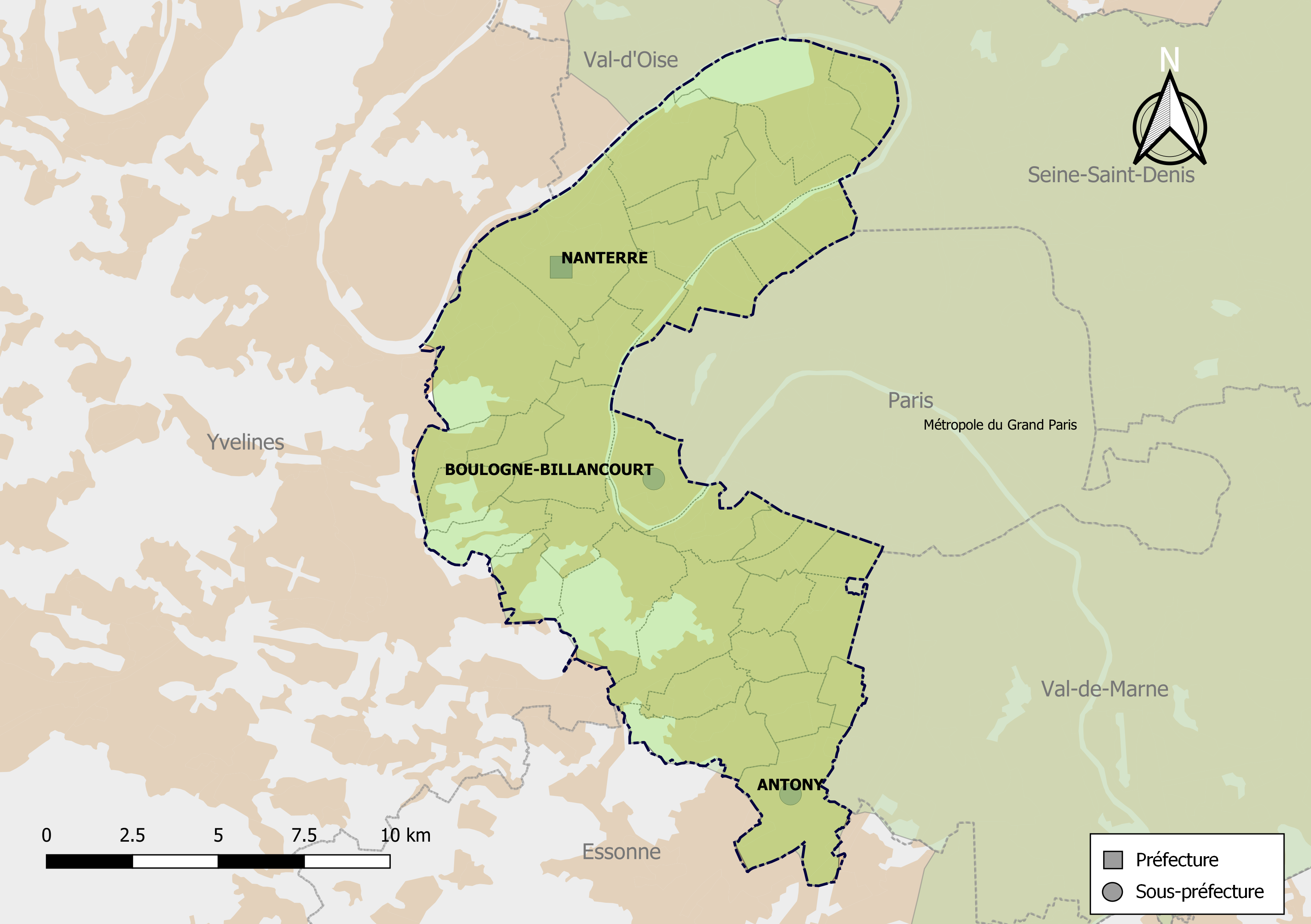 Carte des intercommunalités du département des Hauts-de-Seine, France. Composition au 1er janvier 2019.